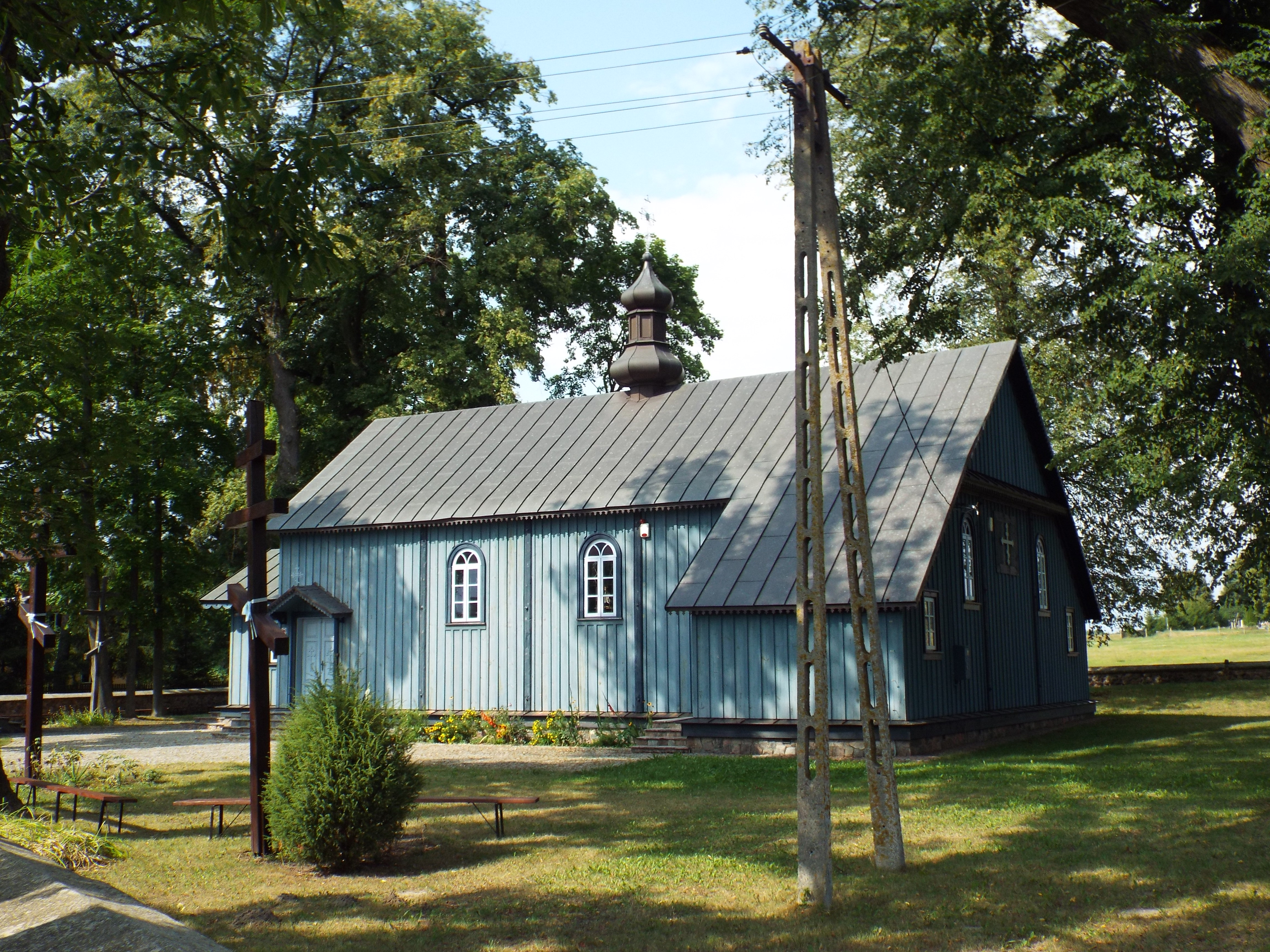 Hola - cerkiew prawosławna